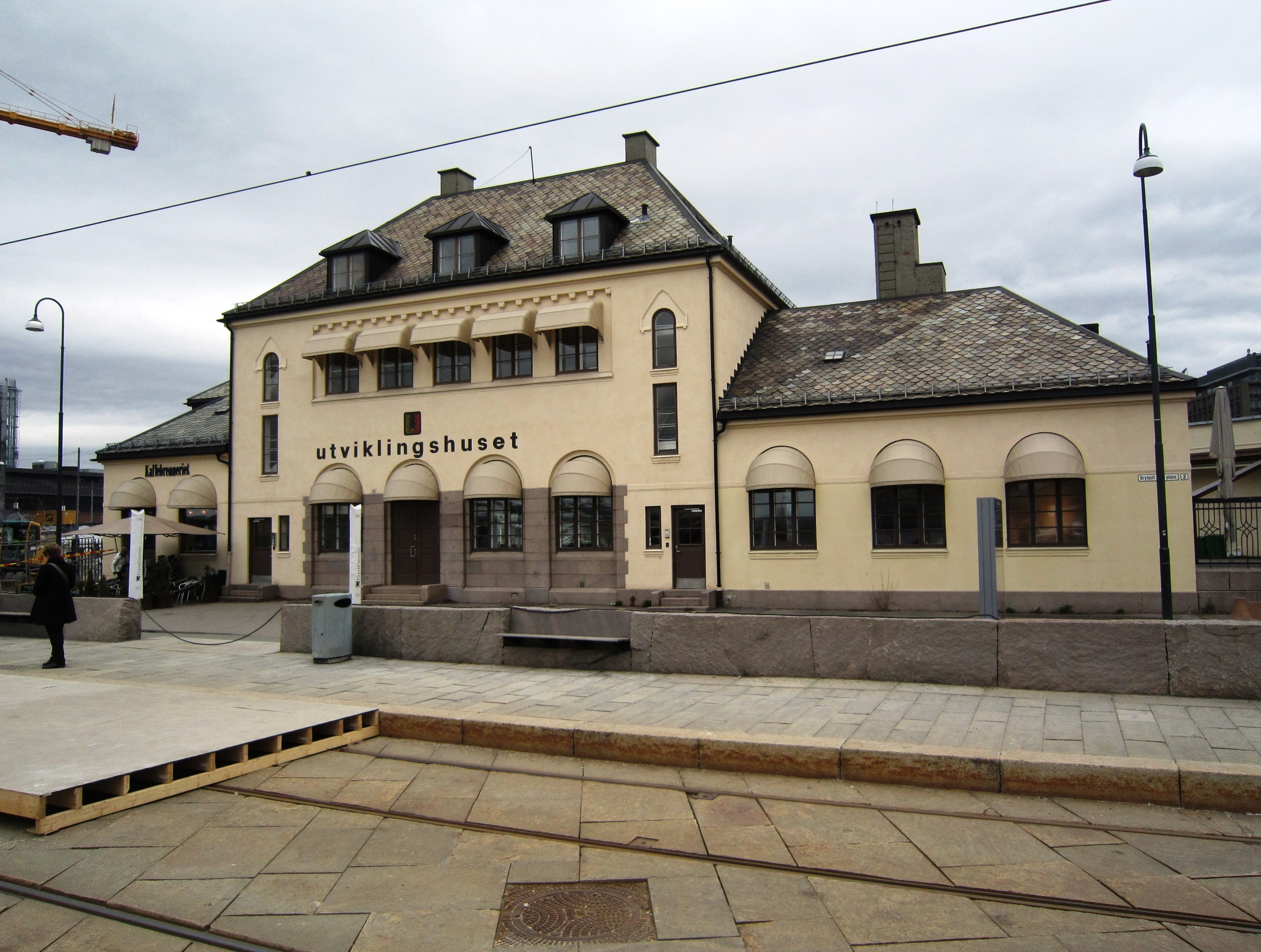 Den tidligere lokalstasjonen ved Vestbanen, med adresse Brynjulf Bulls plass 2. Arkitekt: Ivar Næss.